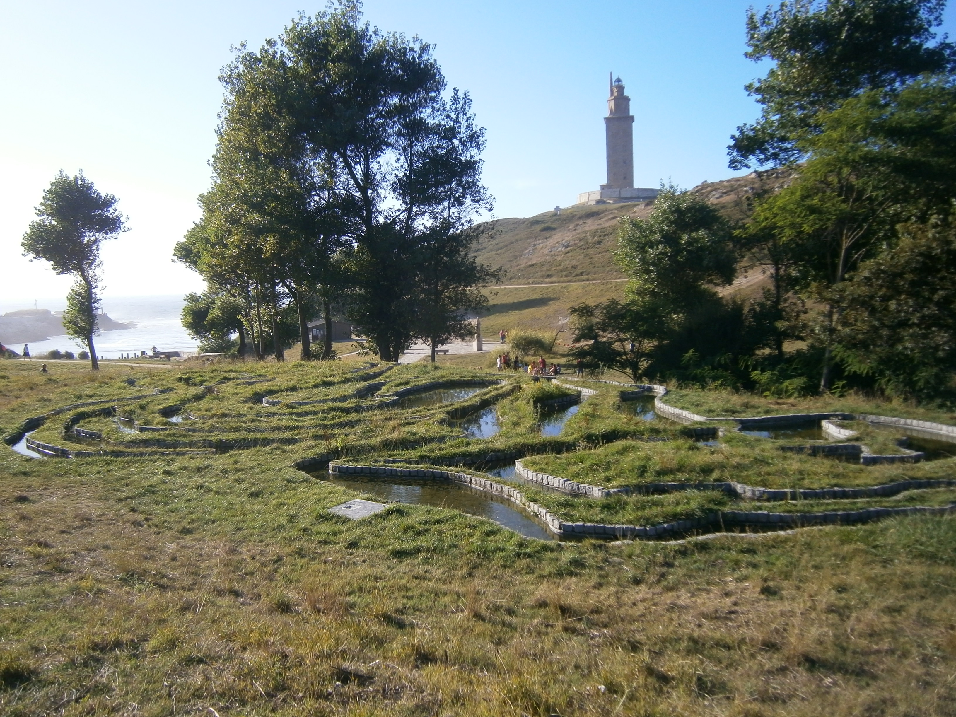 "Combate entre Hércules e Xerión", de Xosé Espona e Tim Behrens, no parque escultórico da Torre de Hércules